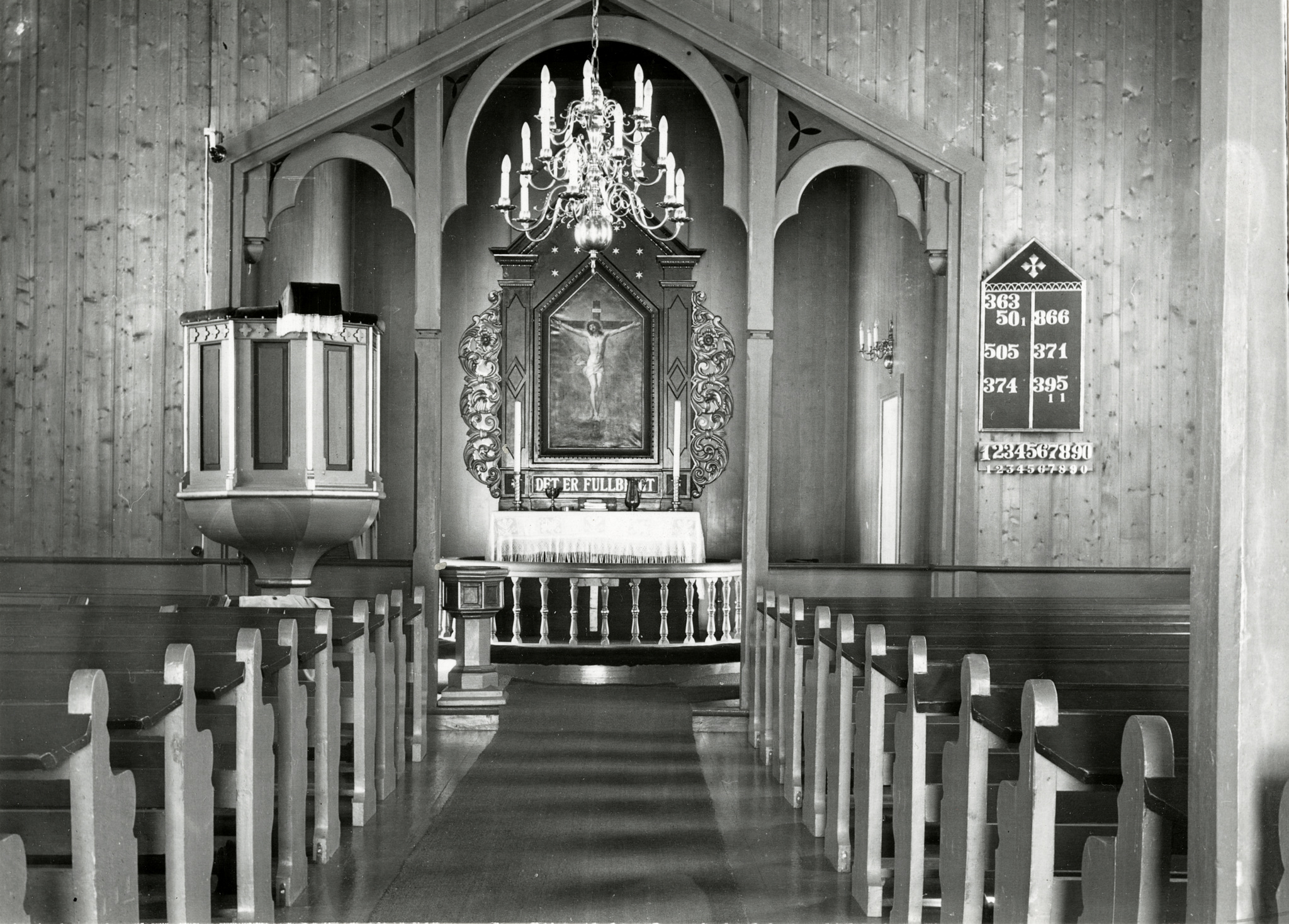 Interiør i Leveld kirke. Alterbilde malt av Christen Brun i kopi etter Guido Reni. Foto: Ola Seter (1959). Fra Riksantikvarens Kulturminnebilder.